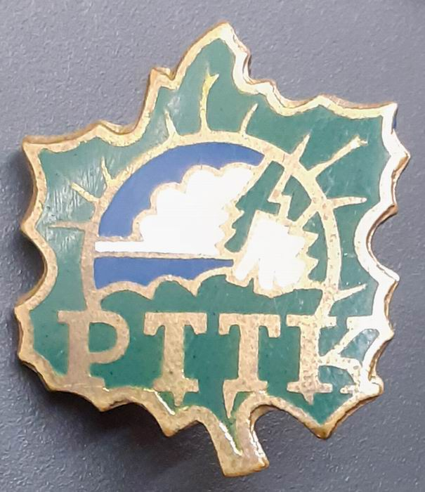 Popularna Odznaka Turystyki Pieszej (OTP) PTTK.